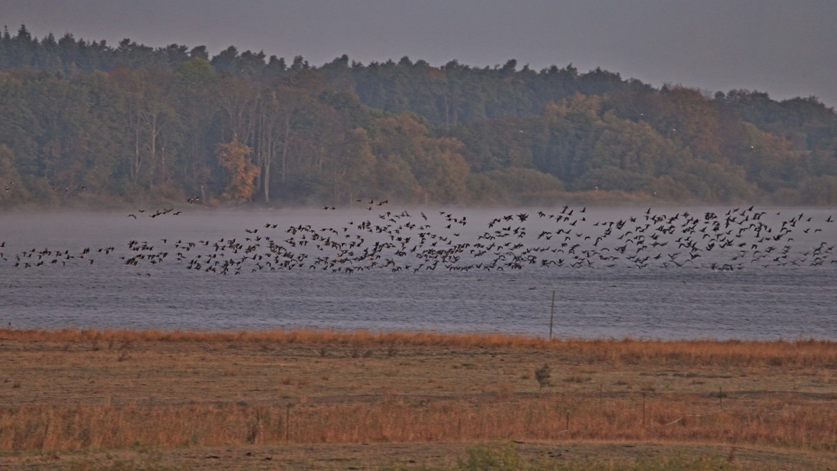 Abflug von Gänsen an der Müritz in das Winterquartier